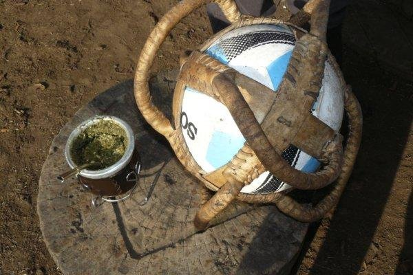 mate y el juego del Pato son dos traciciones argentinas